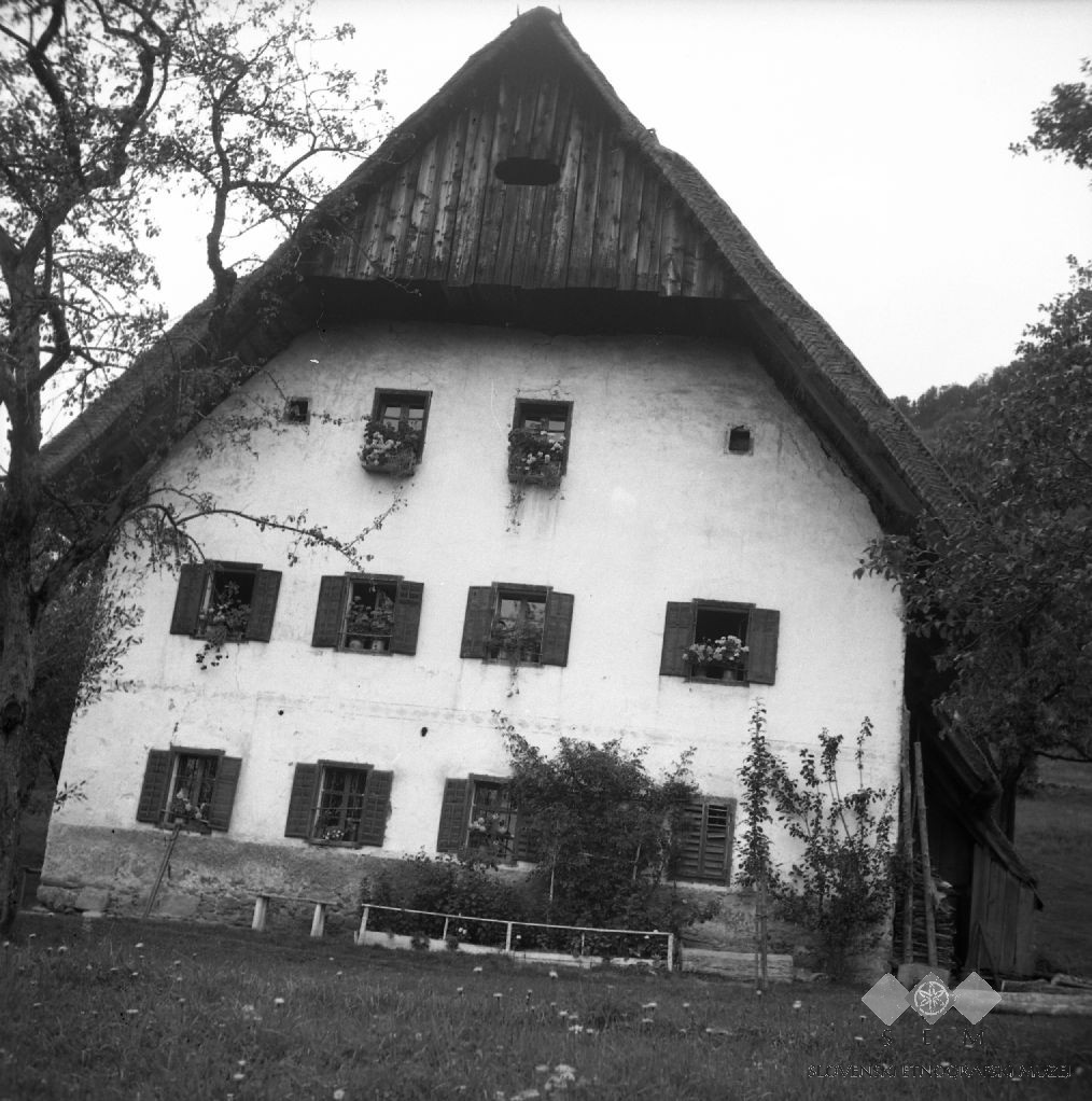 Velika kmet. hiša "na Prelas", Gorenji Novaki (hiša ima letnico 1793).